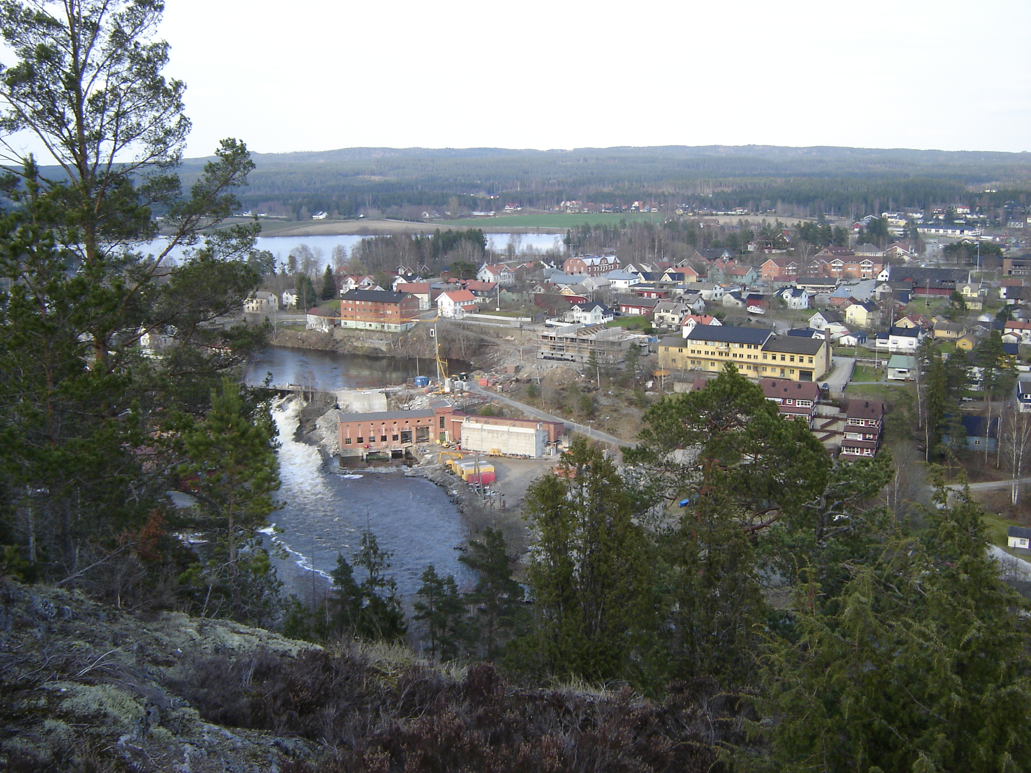 Oversiktsbilde over Ørje tatt på Nordre Fort.